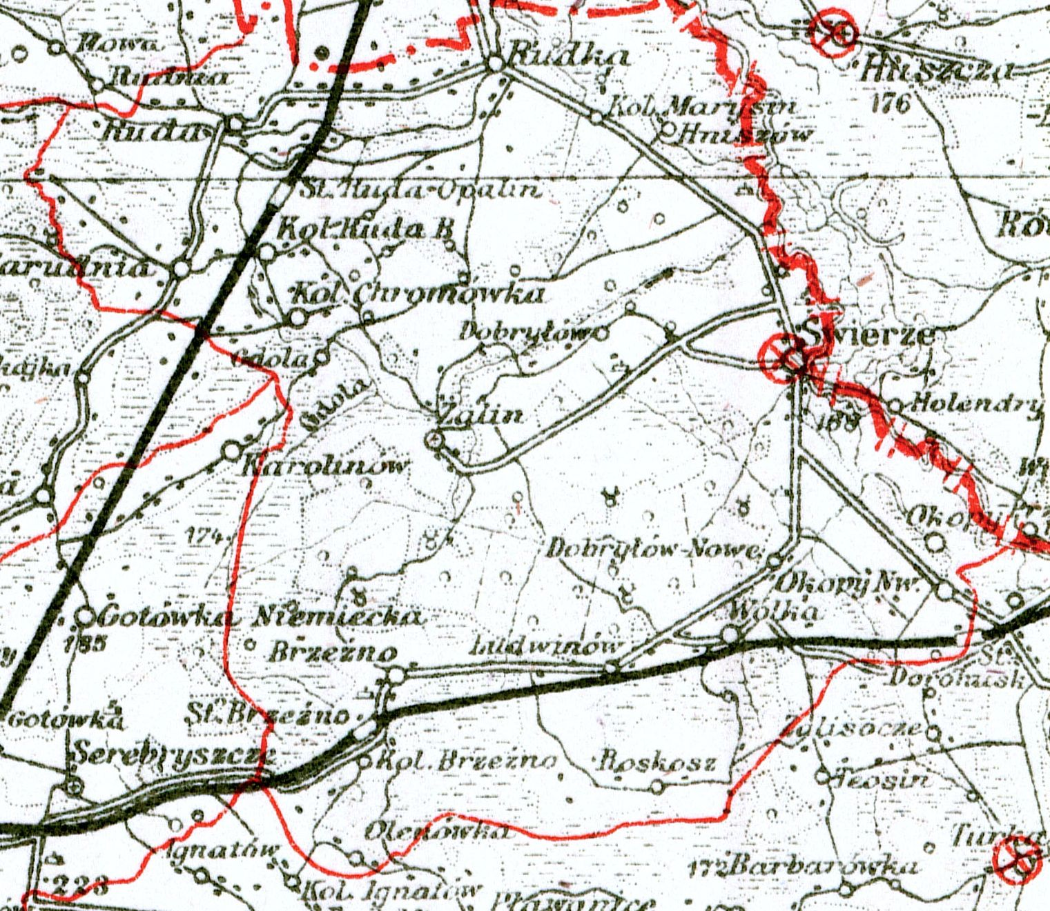 Gmina Świerże (powiat chełmski) na mapie administracyjnej Rzeczypospolitej z 1937 r